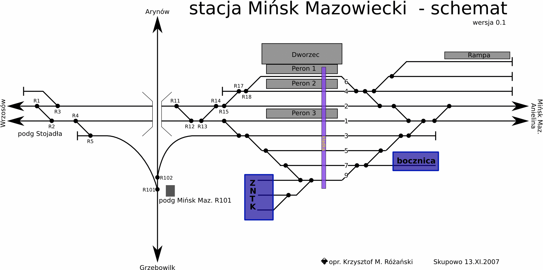 schemat stacji Mińsk Mazowiecki wersja 0.1. Możliwe pewne nieścisłości, brakuje też nrów rozjazdów. Proszę zgłaszać/poprawiać. Stacja posiada 8 torów z możliwością przejazdu bez zatrzymania. Dodatkowo niektóre z nich rozdzielają się na stacji towarowej i w ZNTK (bardzo rozległe torowisko wewnętrzne). 2 tory magistrali Warszawa-Terespol, tory 1. i 2., peron 3. bocznice po stronie północnej, toru 2. bocznica wspólna dla peronu 2. i stacji towarowej, tor 4. bocznica dla peronu 1., tor 6. 2 bocznice dla stacji towarowej bocznice po stronie południowej, toru 1. 4 bocznice manewrowe, tory 3., 5., 7., 9. łącznica 522., z toru 3. (Mińsk Mazowiecki R101) 2 tory do ZNTK "Mińsk Mazowiecki", z toru 9. tor do Fabryki Urządzeń Dźwigowych, z toru 7.